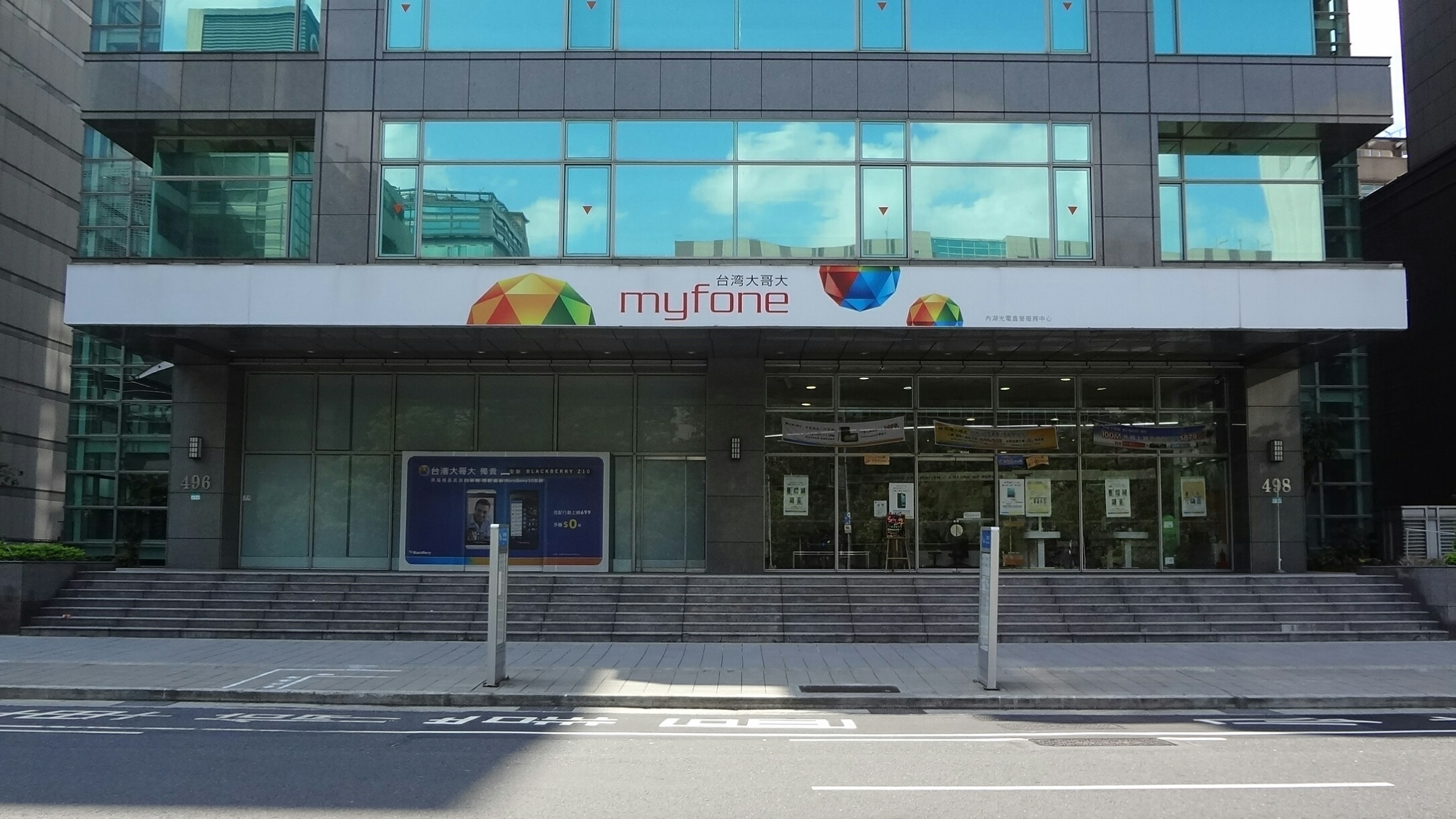 台灣大哥大內湖光電直營服務中心，地址：臺北市內湖區瑞光路496、498號1樓。